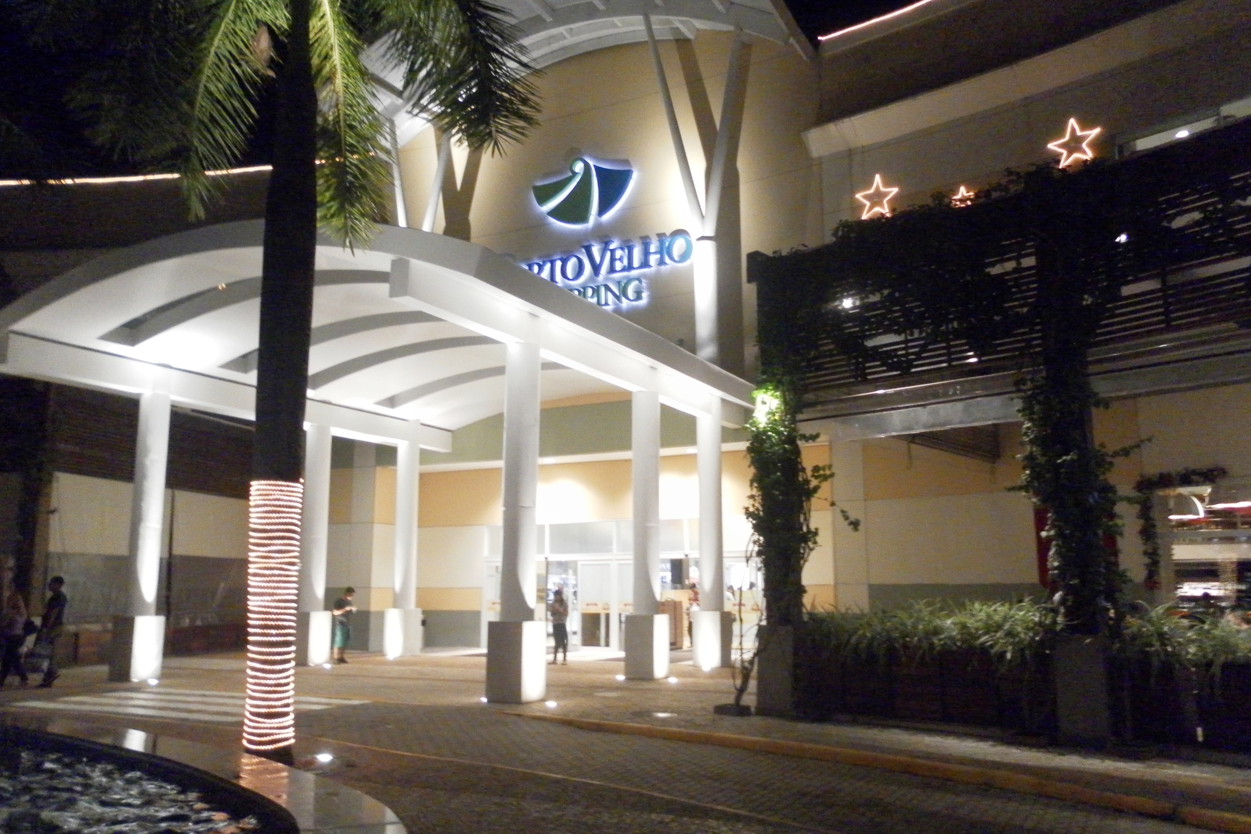 Entrada do Porto Velho Shoping em Rondônia.